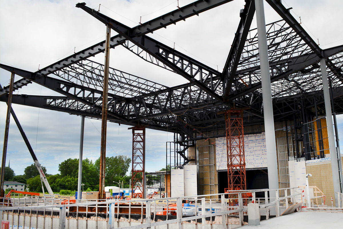 Amphithéâtre de Trois-Rivières en construction